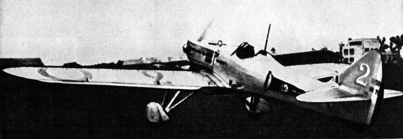 Francuski samolot myśliwski Dewoitine D.500.